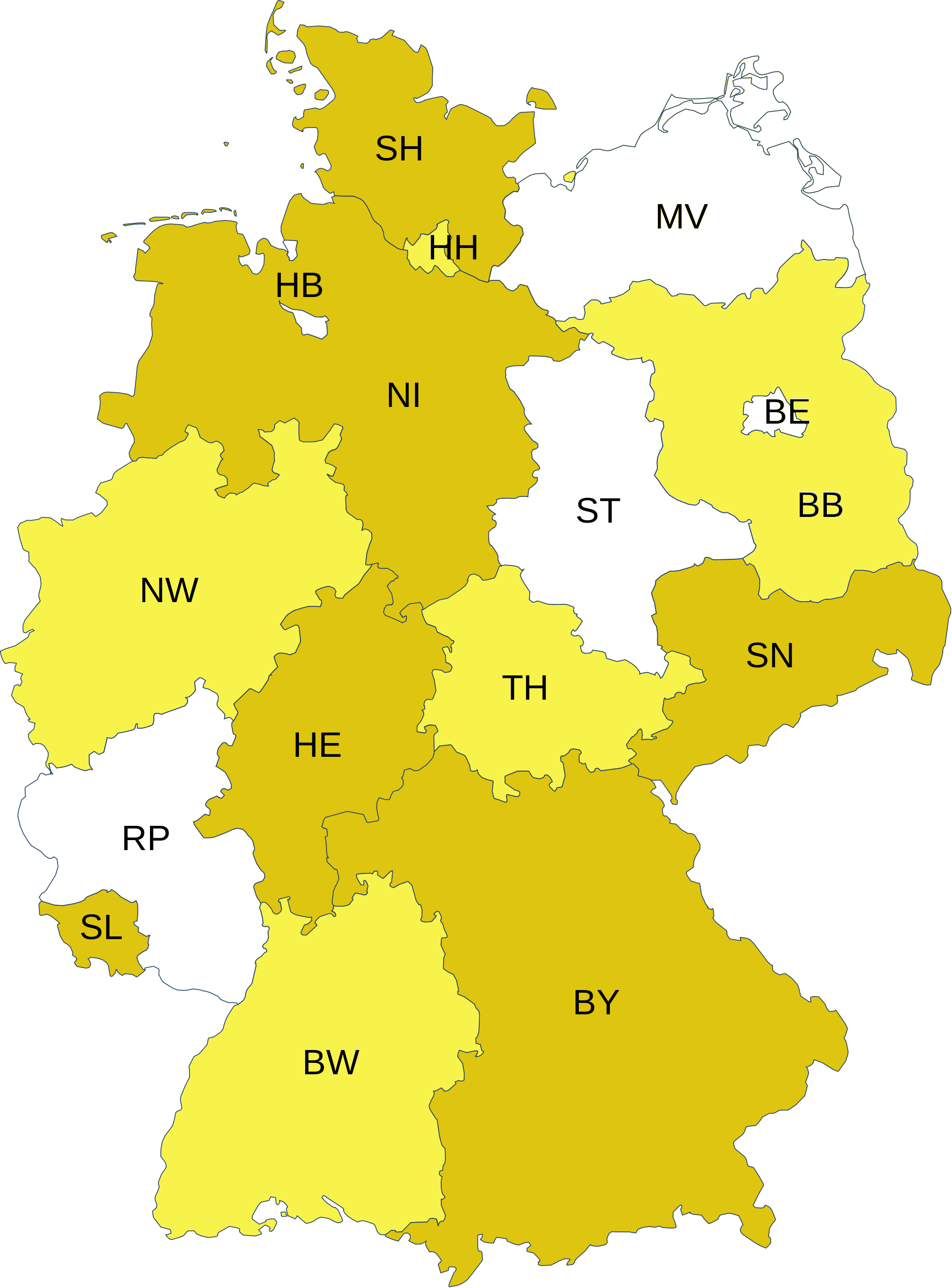 FDP-Landtage Stand 2.10.2011